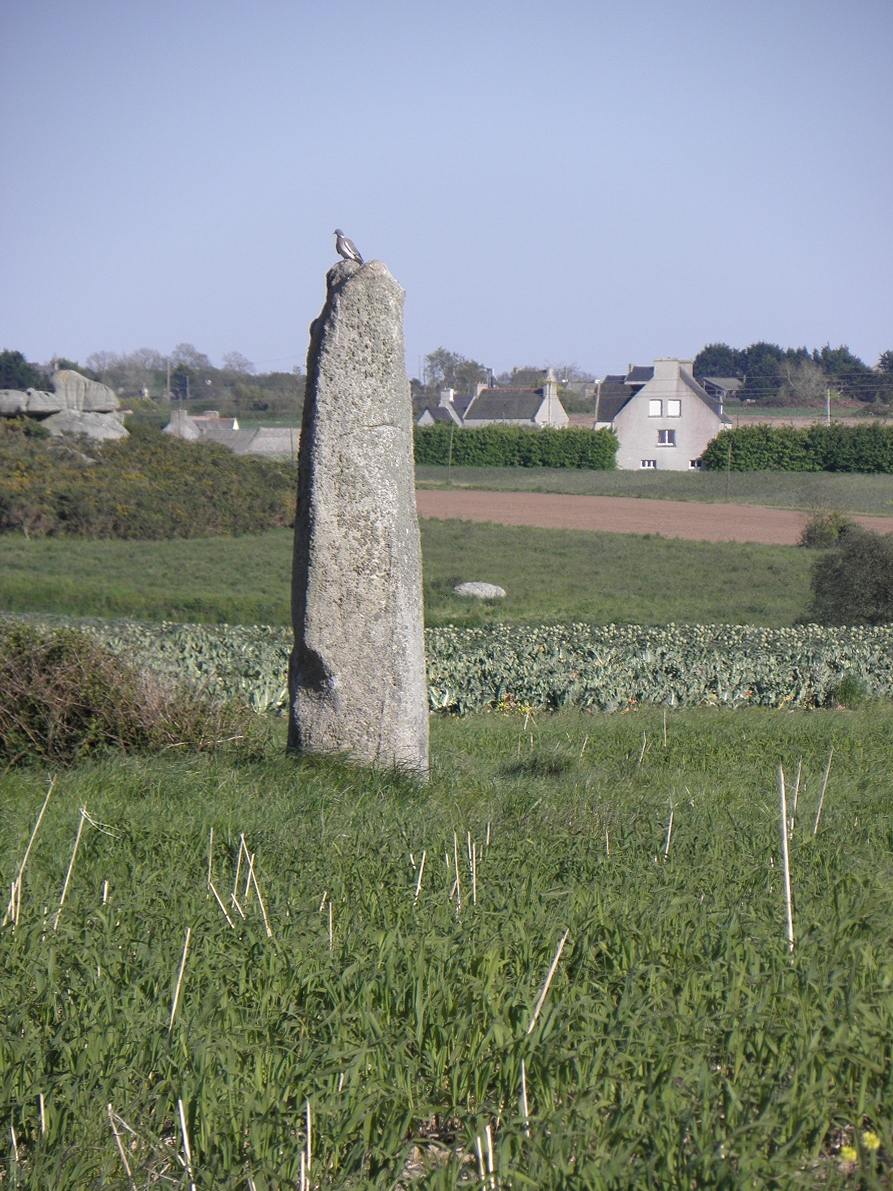 Menhir d'Irvit sis à PLouescat (29).